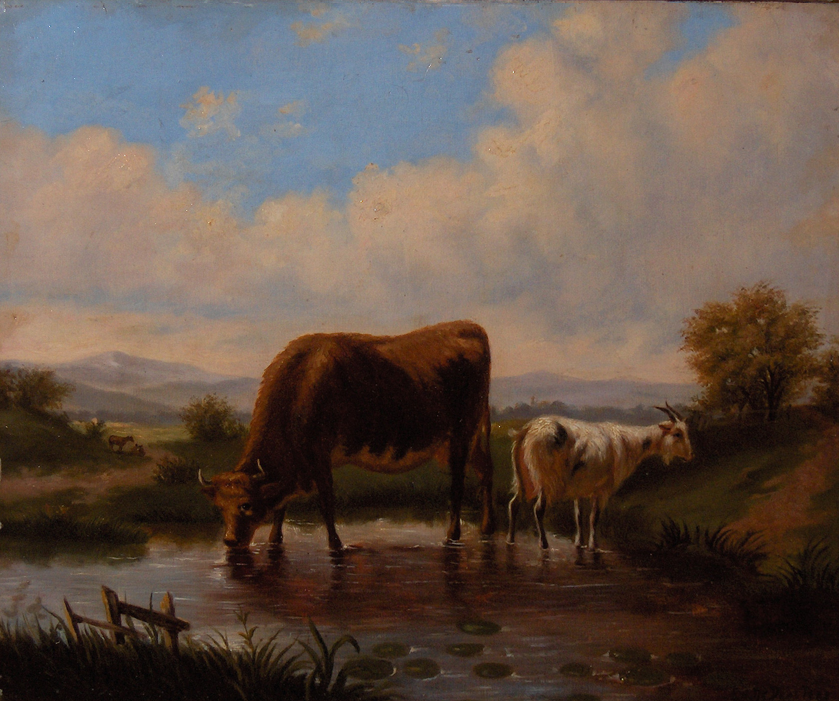 "Landschap met koe en geit" door Edmond de Pratere (1826-1888)